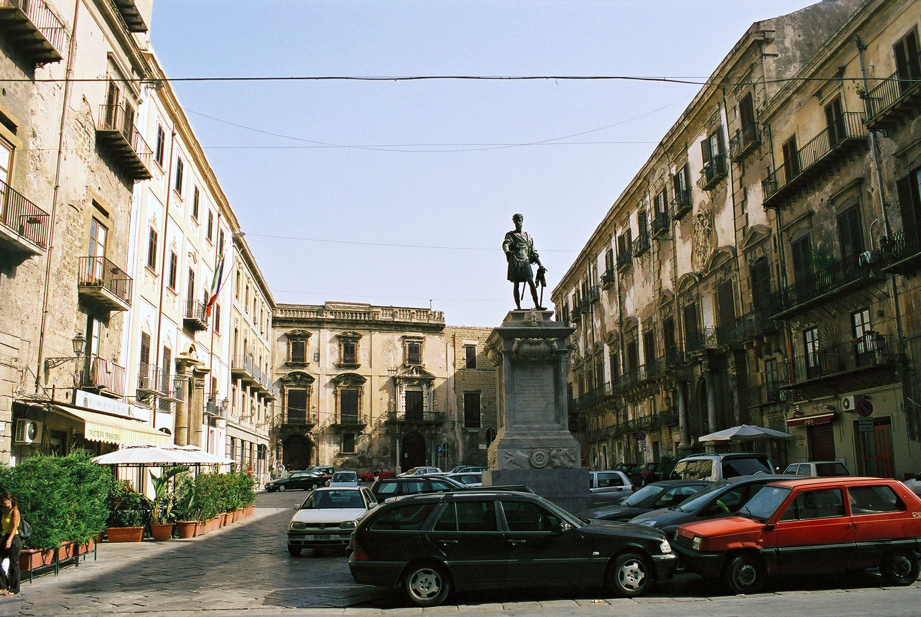 Piazza-Bologni, a Palermo. Al centro la statua di Carlo V, a destra palazzo Alliata di Villafranca